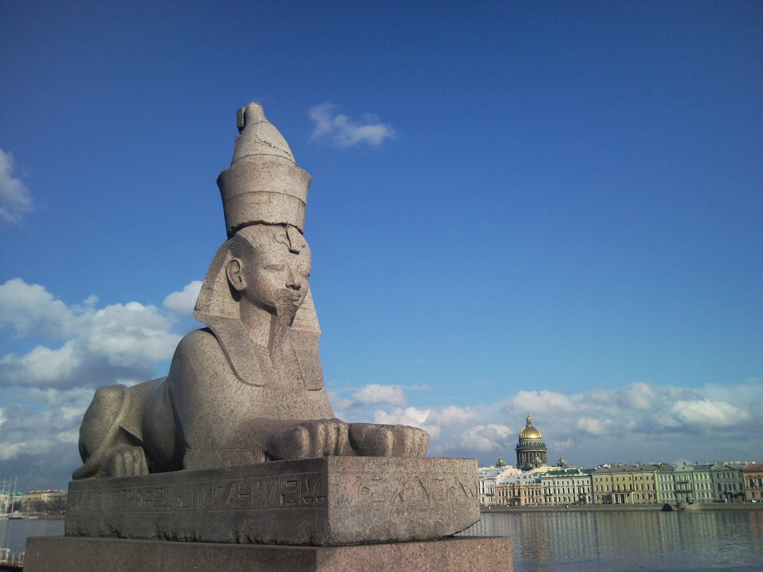 Пристань со сфинксами на Университетской набережной